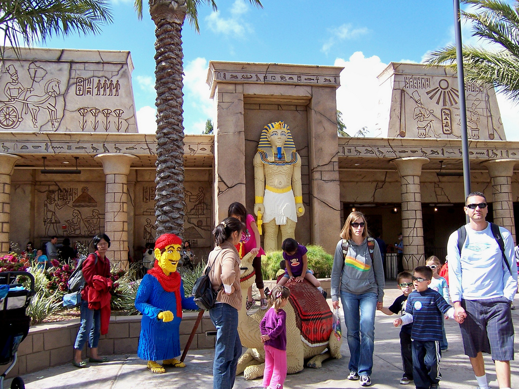 Day 2 - Legoland.